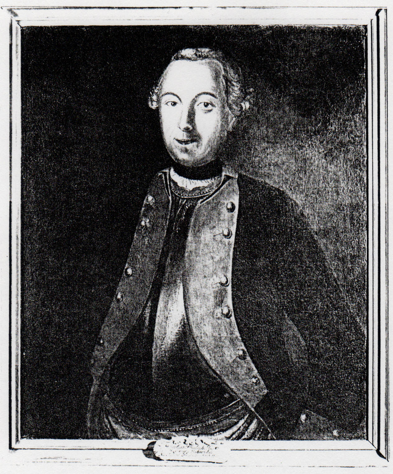 Christian Friedrich von Pfuel (* 1653; † 1702) war ein königlich-preußischer Oberst, Erbherr auf Gielsdorf, Wilckendorf und Jahnsfelde.